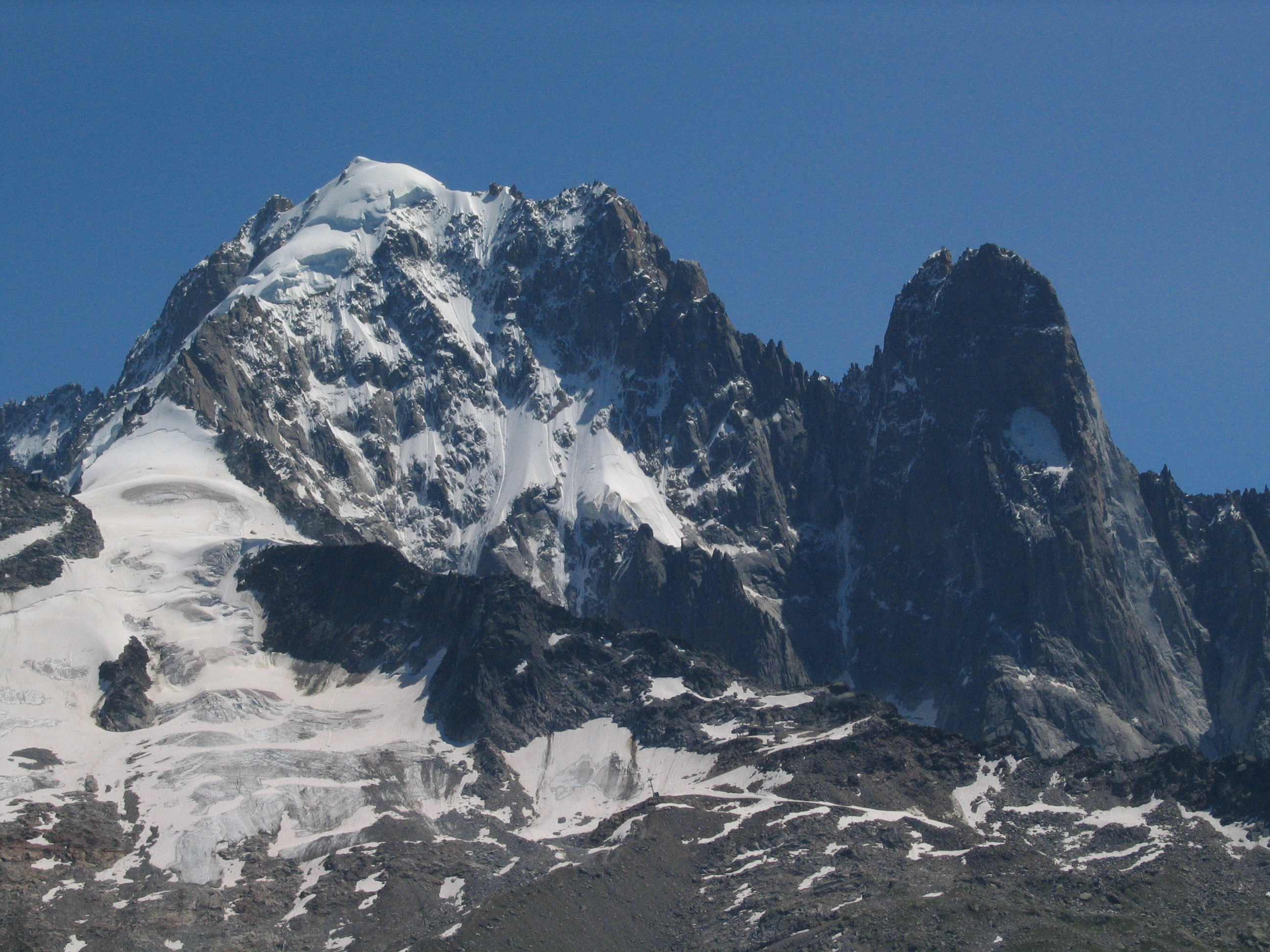 L'Aiguille Verte (4122 m) et l'Aiguille du Dru (3754 m) vus de la Montagne de la Flégère (chemin du tour du Mont Blanc), massif du Mont Blanc, Chamonix, France